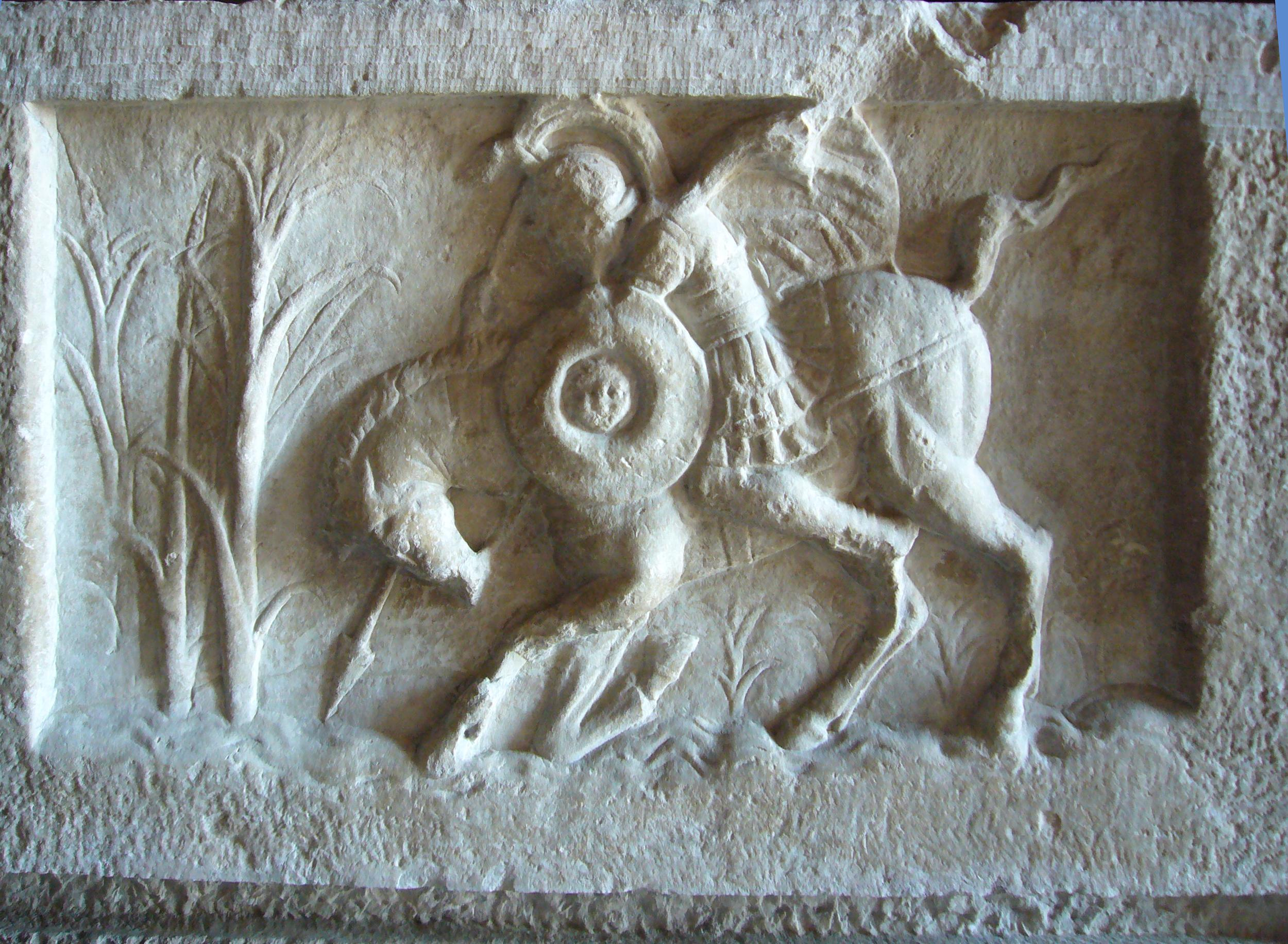 Roma, Tabularium: rilievo originale dell'episodio di Marco Curzio al Lacus Curtius